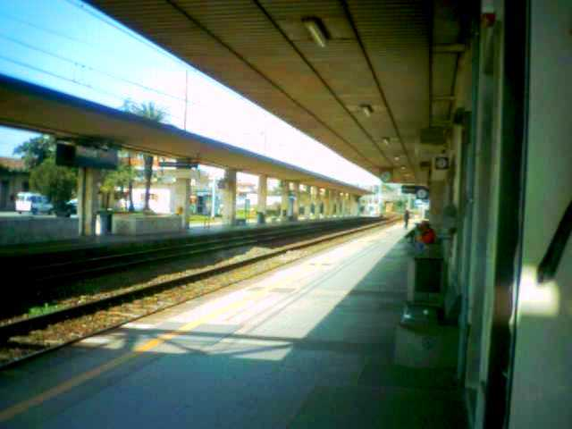 Stazione di Massa Centro (MS)